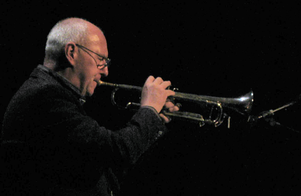 Uli Beckerhoff, deutscher Jazz-Musiker, bei einer Veranstaltung (Konzert-Lesung) am 9. Mai 2009 im Haus im Park in Bremen, Deutschland